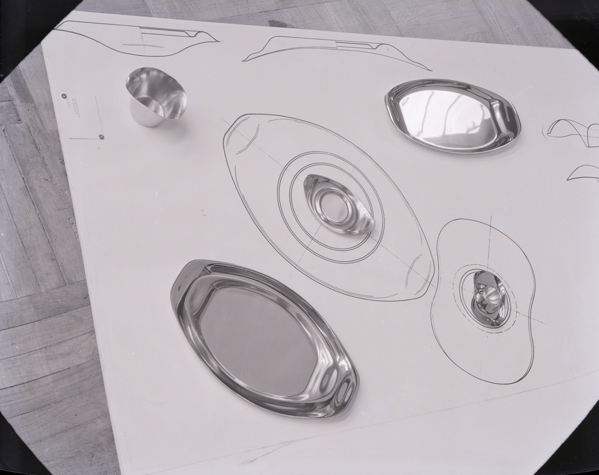 Milano. X Triennale. Vassoi e contenitori in acciaio disegnati da Roberto Sambonet. Servizio fotografico : Milano, 1954 / Paolo Monti. - Buste: 2, Fototipi: 2 : Negativo b/n, gelatina bromuro d'argento/ pellicola ; 10x12. - ((Serie costituita da 2 negativi identificati con i nn.: 20996-20997. La suddetta serie è contenuta nella scatola identificata con la numerazione 20992-21055. Sulla scatola manoscritto con pennarello nero: "X dal 1381 al 1490". La scatola è a sua volta contenuta in una scatola grande col coperchio giallo. - Occasione: Documentazione della X Triennale del 1954, intitolata "Prefabbricazione - Industrial Design: Esposizione Internazionale delle Arti Decorative e Industriali Moderne e dell'Architettura Moderna". L'esposizione si tenne presso il Palazzo dell'Arte